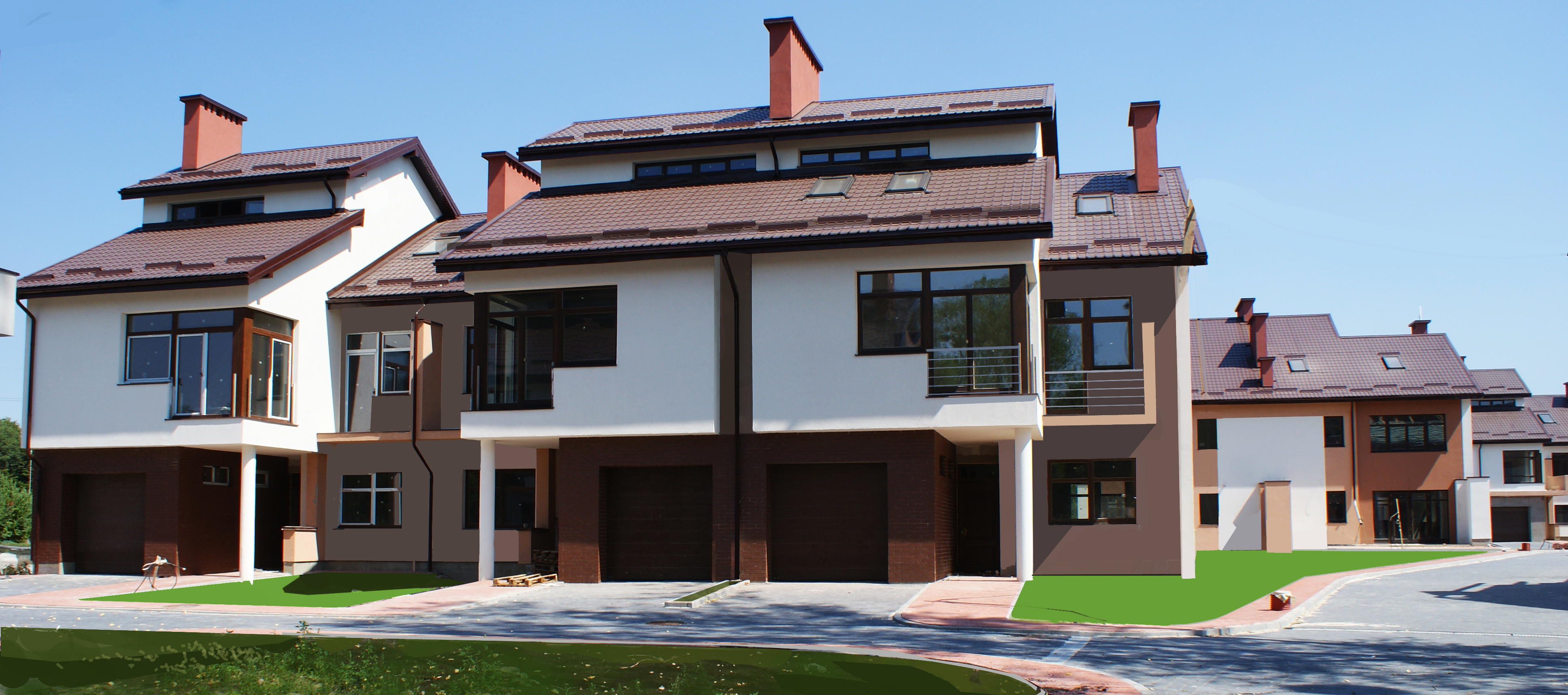 Котеджне містечко на 35 будинків по вулиці Янева у м.Львові.(2012-2016)р.